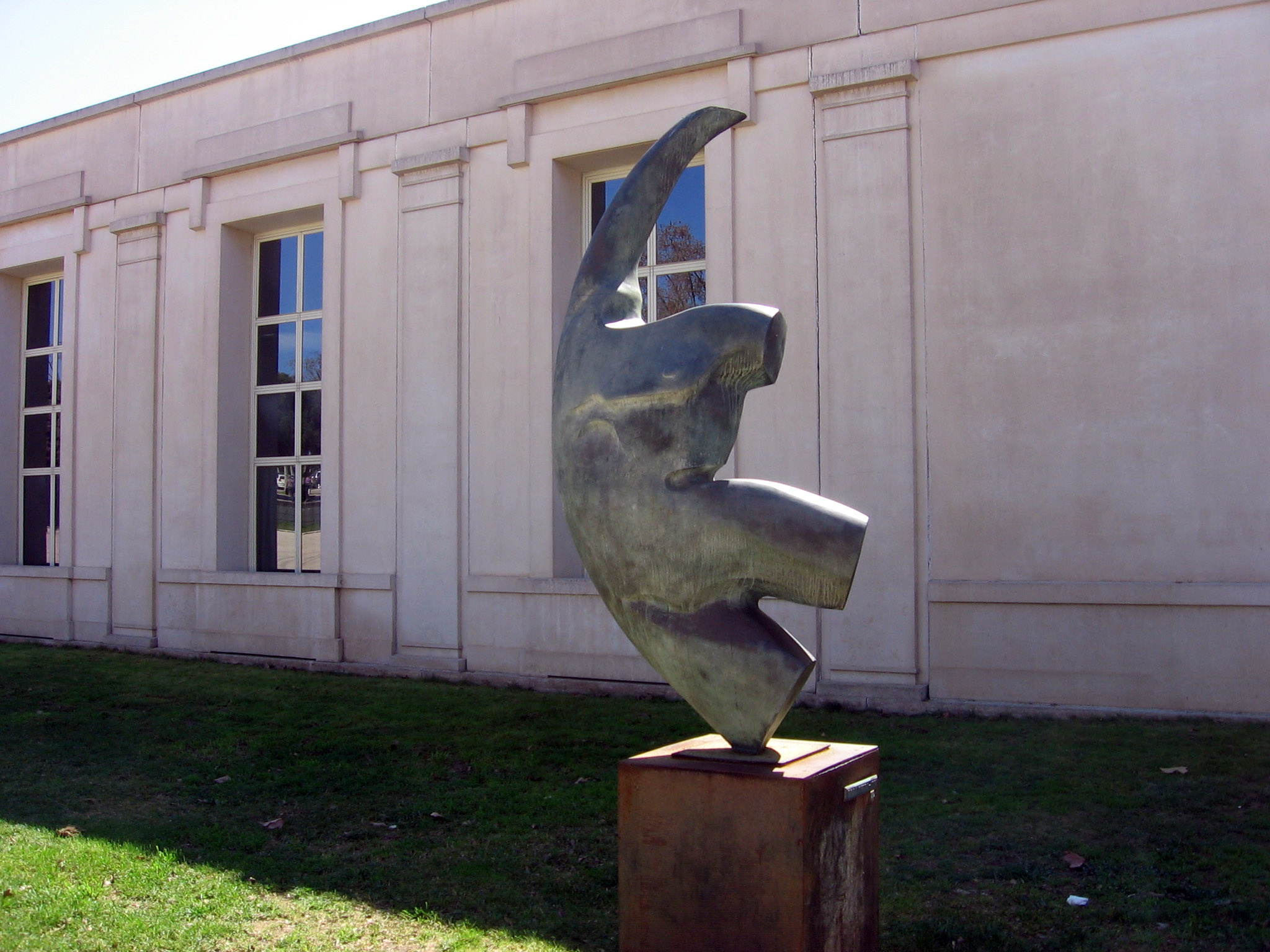 Torso Olímpico (1991), de Rosa Serra, Avenida del Estadio, Barcelona.